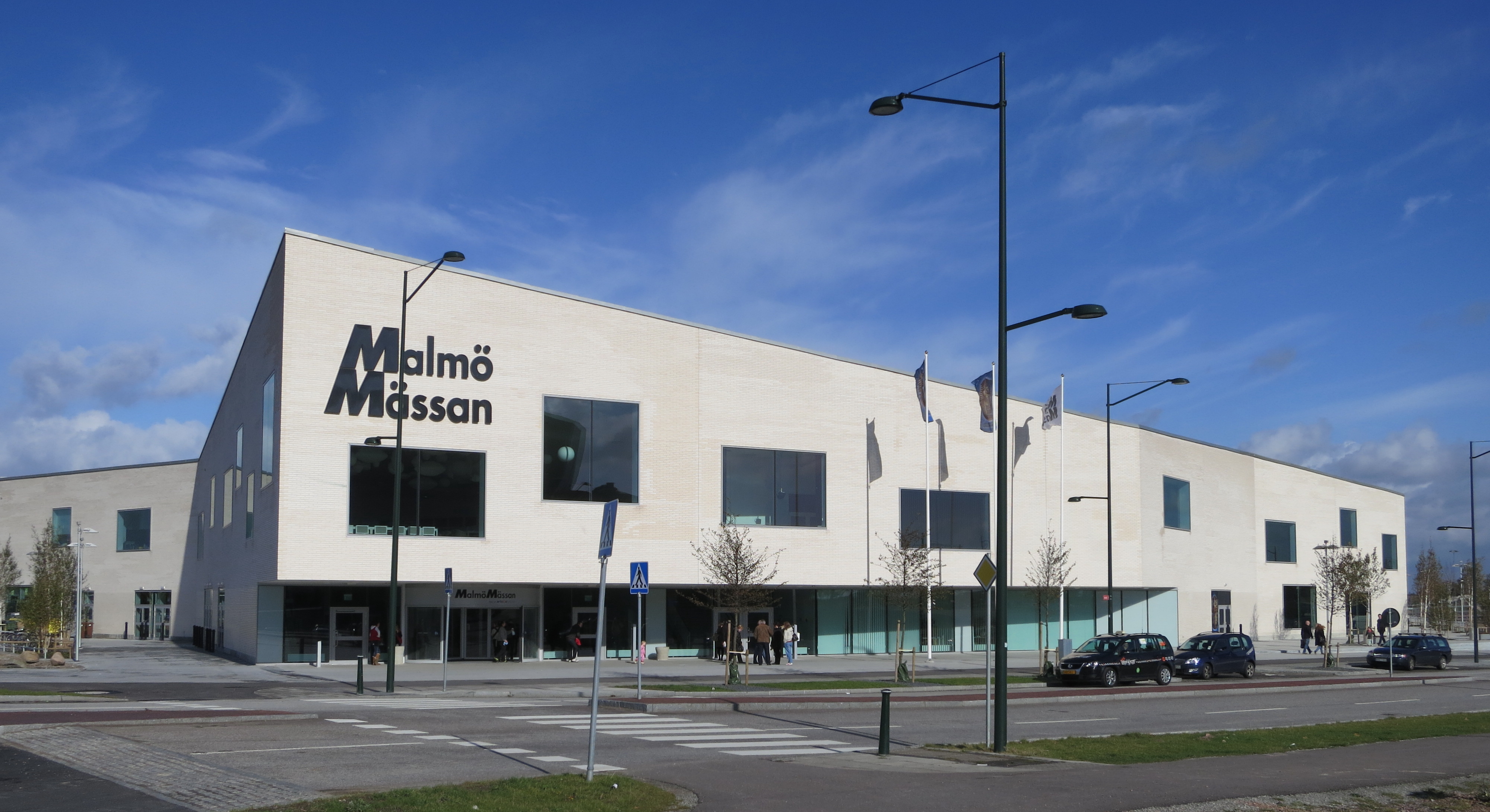 Malmömässans lokaler i Hyllie